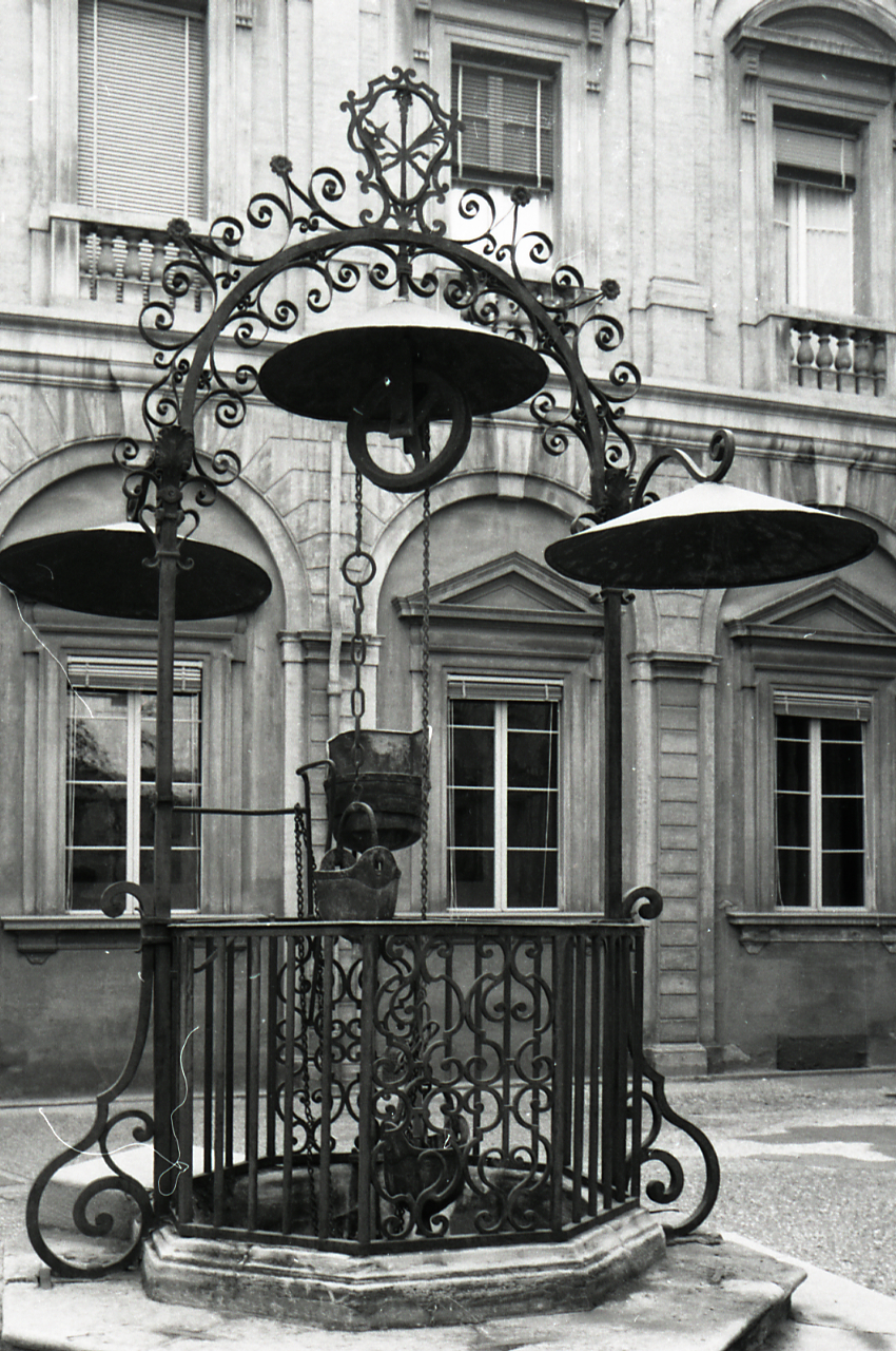 Pozzo in uno dei chiostri dell'ex convento di San Procolo, via d'Azeglio 56, Bologna